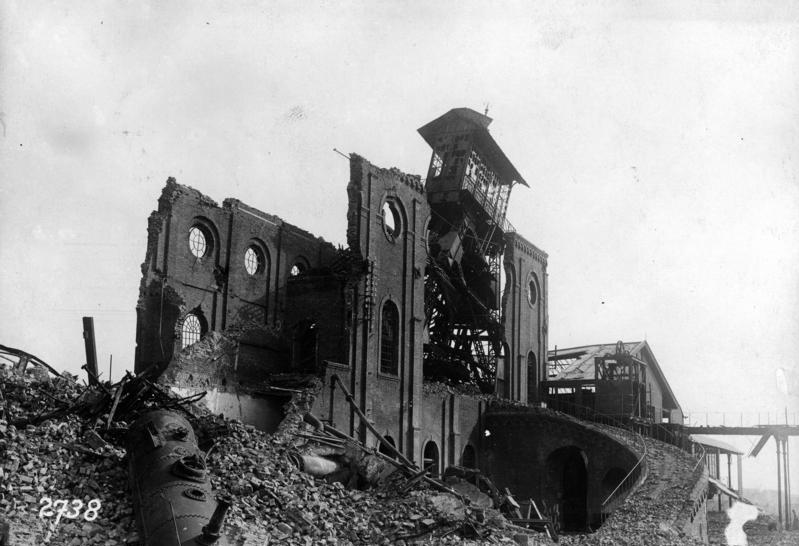 Die Schlacht im Westen. Eine durch engl. Feuer zerstörte Zeche bei Lens. (Aisneschlacht) 2738 BUFA Information added by Wikimedia users.